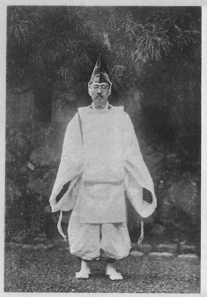 Portrait of Sasaki Nobutsuna (佐佐木信綱, 1872 – 1963)